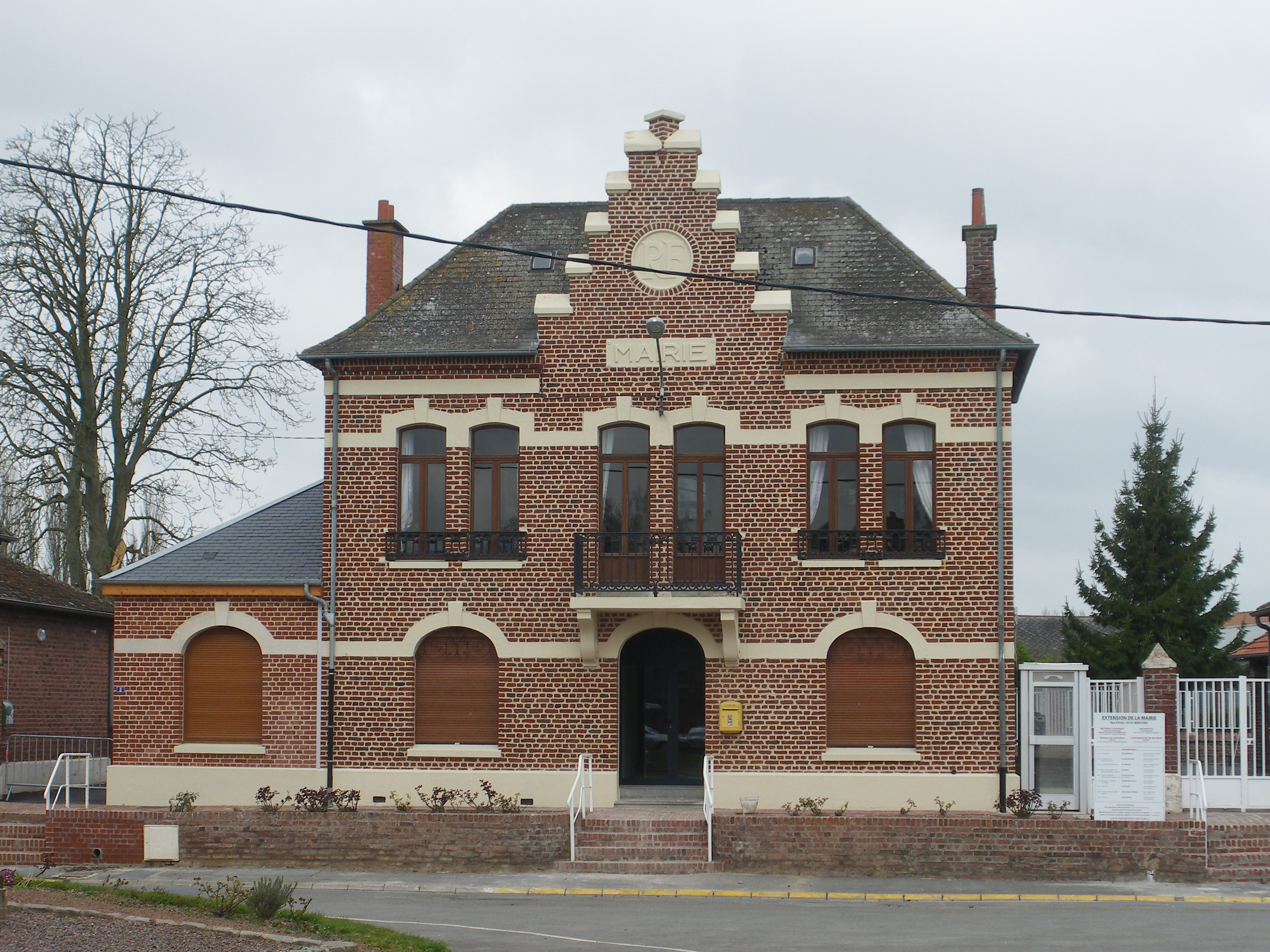 Vue de la mairie de Mœuvres.